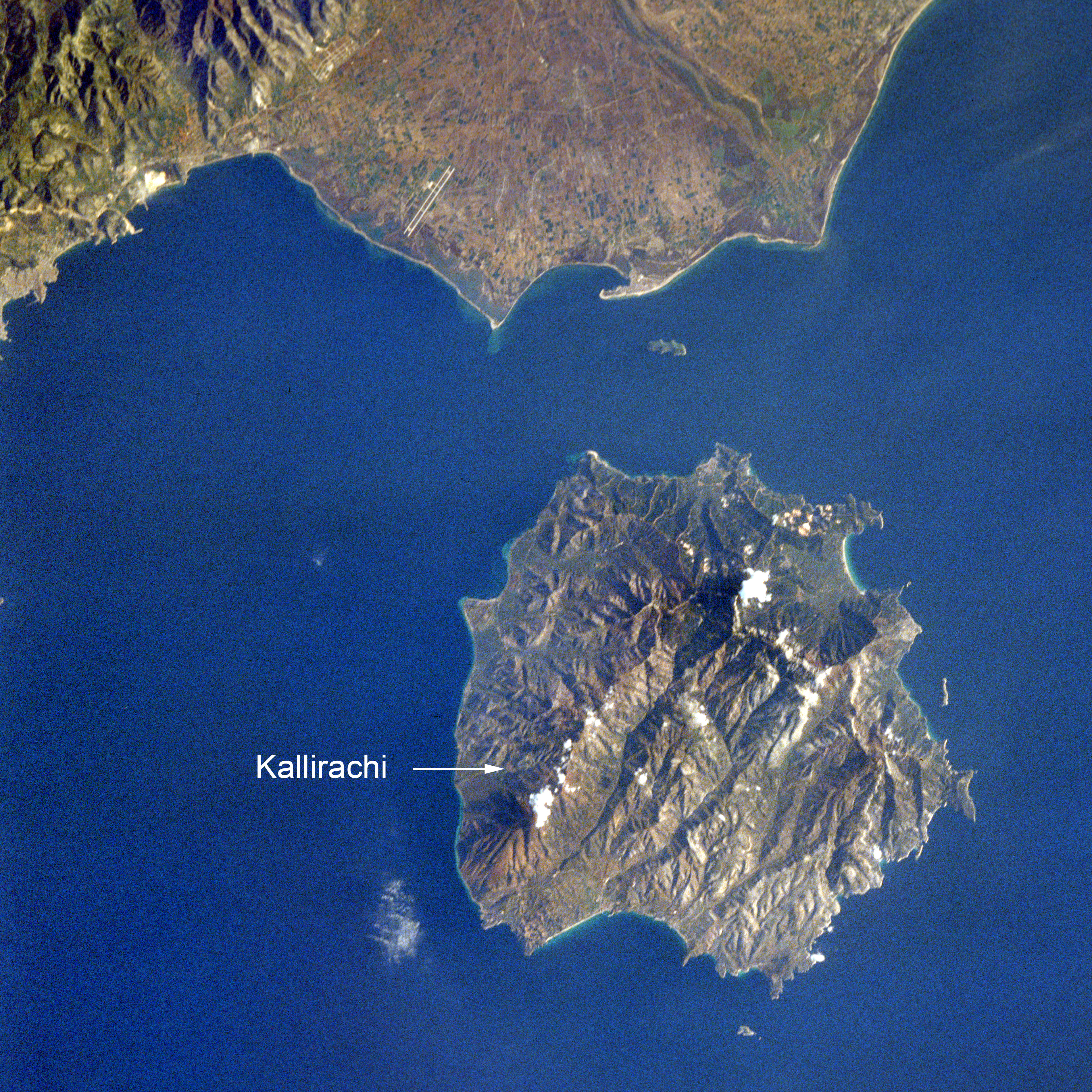 Satellitenbild der Griechischen Insel Thasos, vor der Makedonisch-Thrakischen Küste.